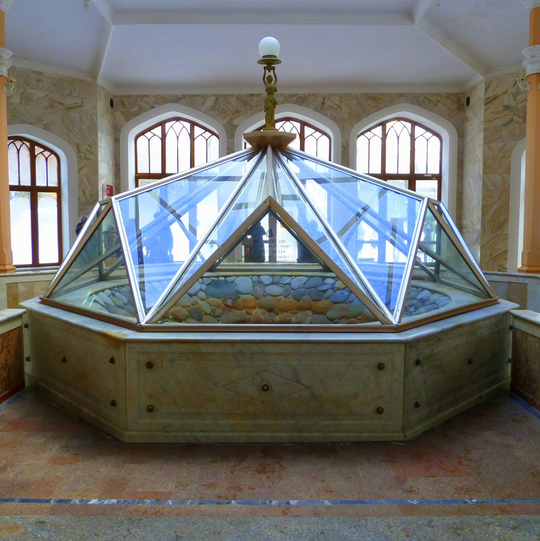 Кисловодск. Нарзанная галерея, каптаж 1894 года